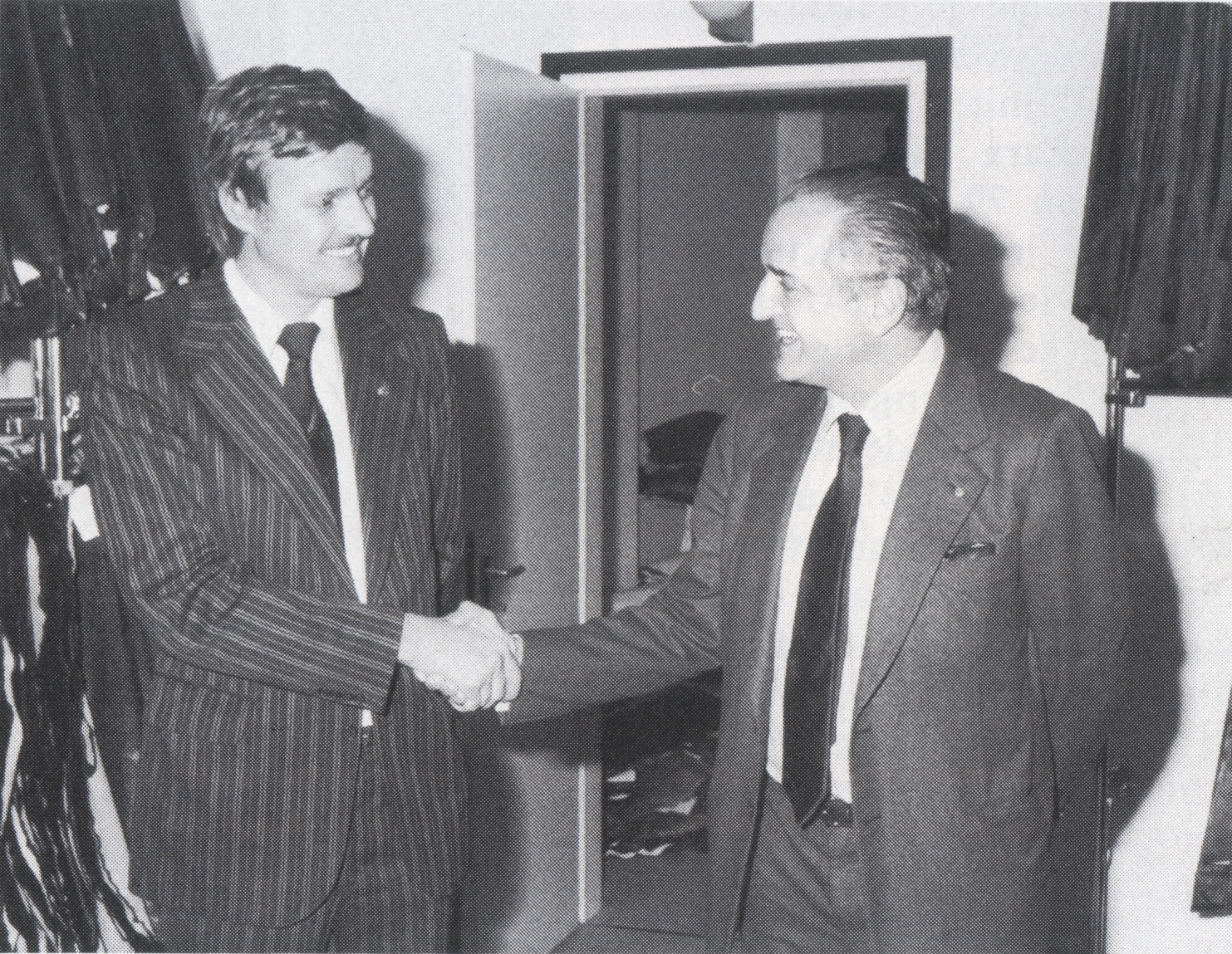 Neueröffnung einer Rauchwarengroßhandlung. Jürgen Thorer (rechts), Rauchwarengroßhändler und Pelzveredler beglückwunscht Oskar Volkmann in den Geschäftsräumen seiner Firma „Sinclair“ im „Gerson-Haus“, Düsseldorfer Straße 1-7. „Sinclair“ ist aus der „SWA-Handelsgesellschaft“ hervorgegangen und wird von seinem Sohn Ernst Oskar Volkmann geführt... Der „Brühl-Newcomer“ hat sich auf Seal in Fellen und Konfektion für Damen und Herren spezialisiert.